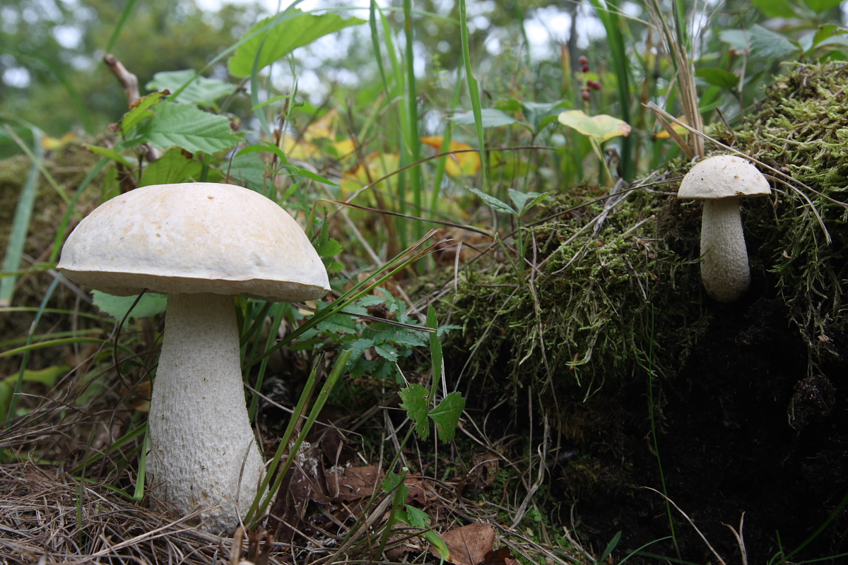 Valge puravik